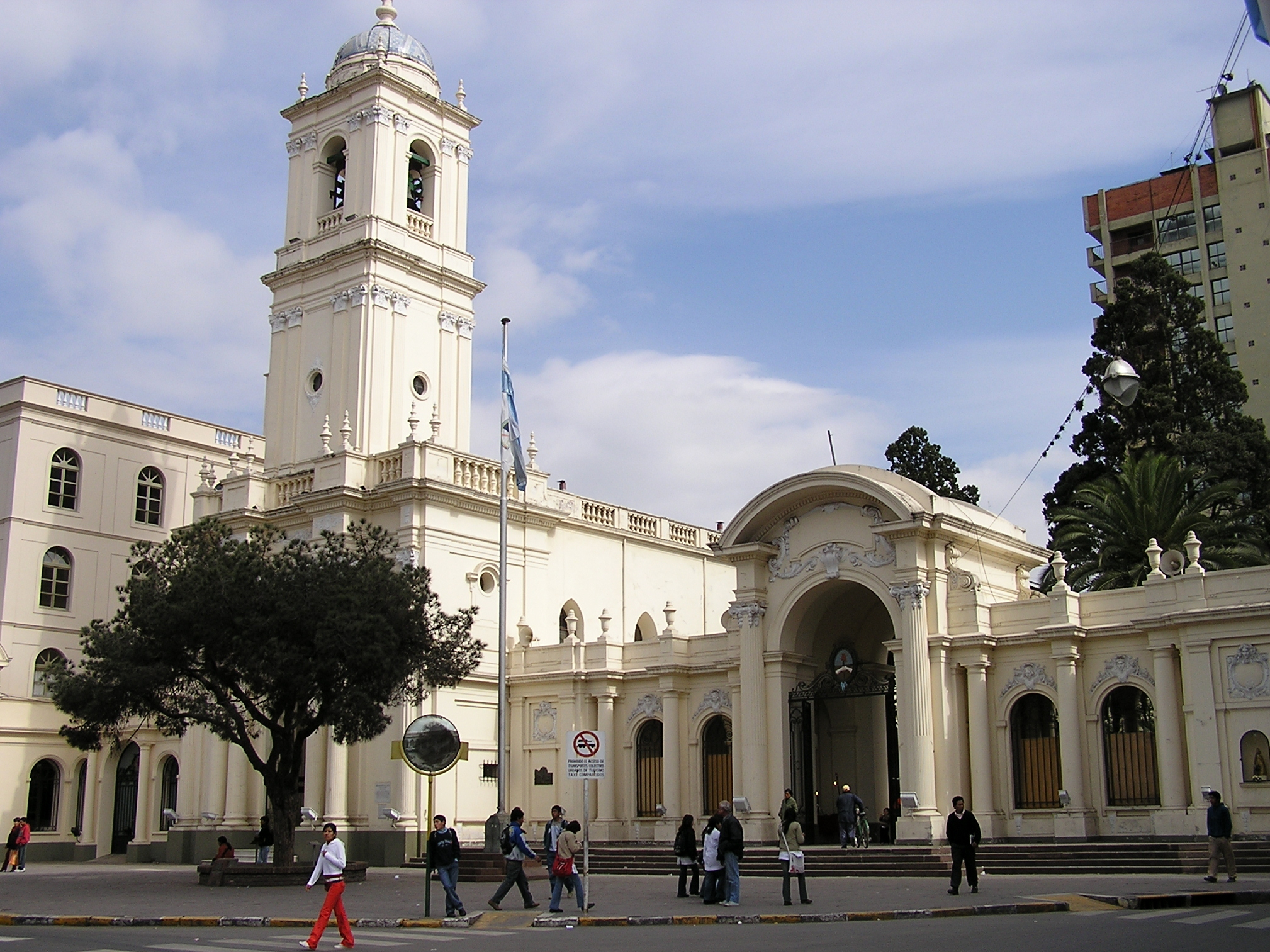 Vista general de la Catedral